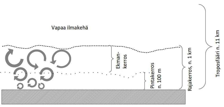 Skemaattinen kuva ilmakehän rajakerroksen rakenteesta. Kuva ei ole mittakaavassa.